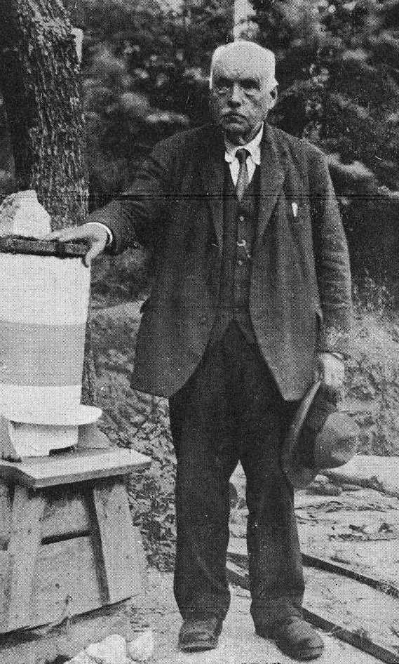 Laureano Salgado Rodríguez, fotografía en Vida Gallega 1928